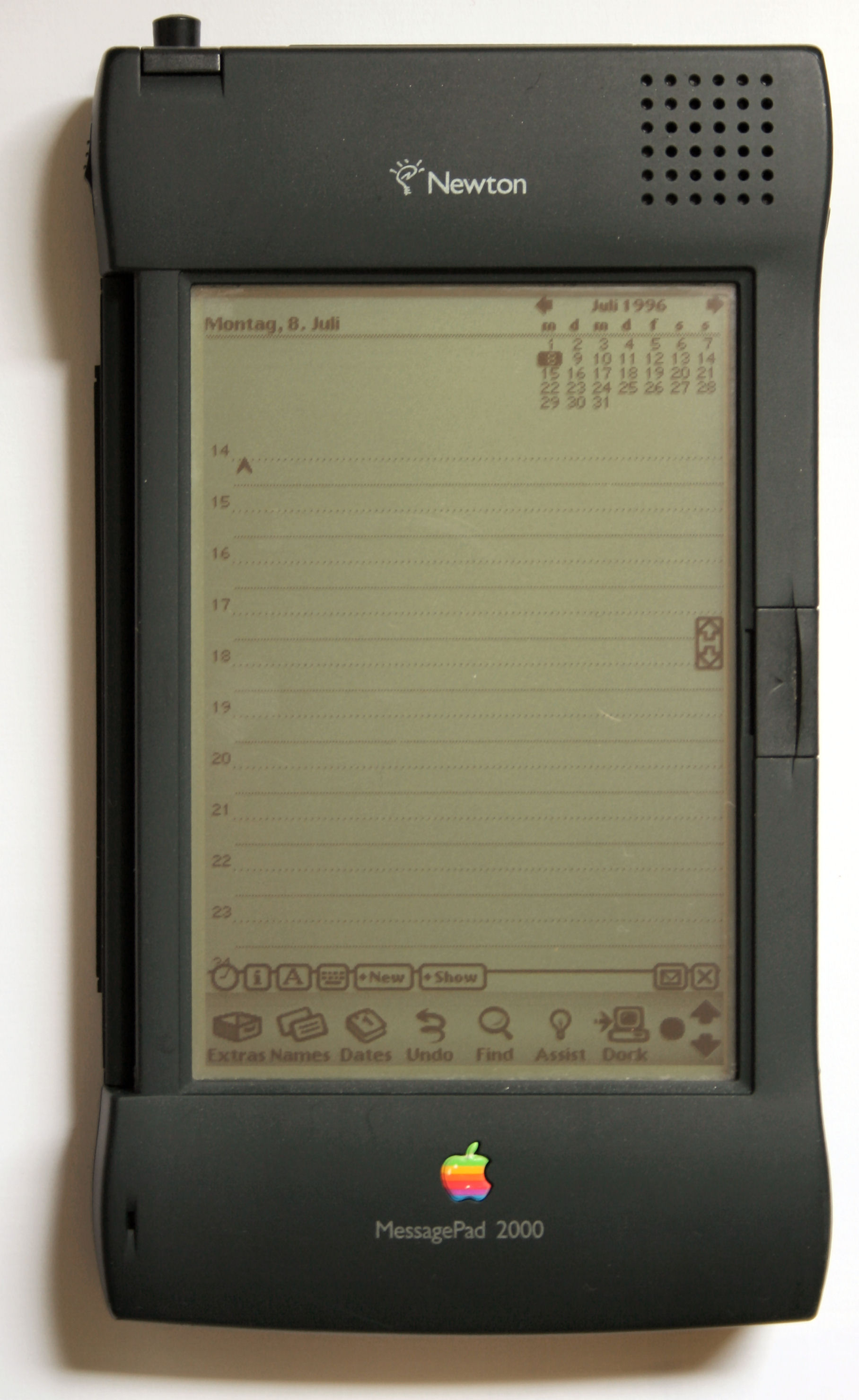 Apple Newton Beschreibung: Apple Newton Message Pad 2000 Fotograf: Ralf Pfeifer Datum: 03.06.2005 Lizenz: GNU-FDL